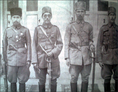 1. Шир Мухаммед-бек Гази, широко распространенное прозвище Курширмат (1895, Гарбаба, Ферганская область — 10 марта 1970) — видный деятель басмаческого движения, с 1923 года в эмиграции и его соратники 2. Лашкарбыши Нурмуххамедбек (его брат) 3. Лашкарбаши мулла Хатам; 4. главный секретарь Назир Кабави